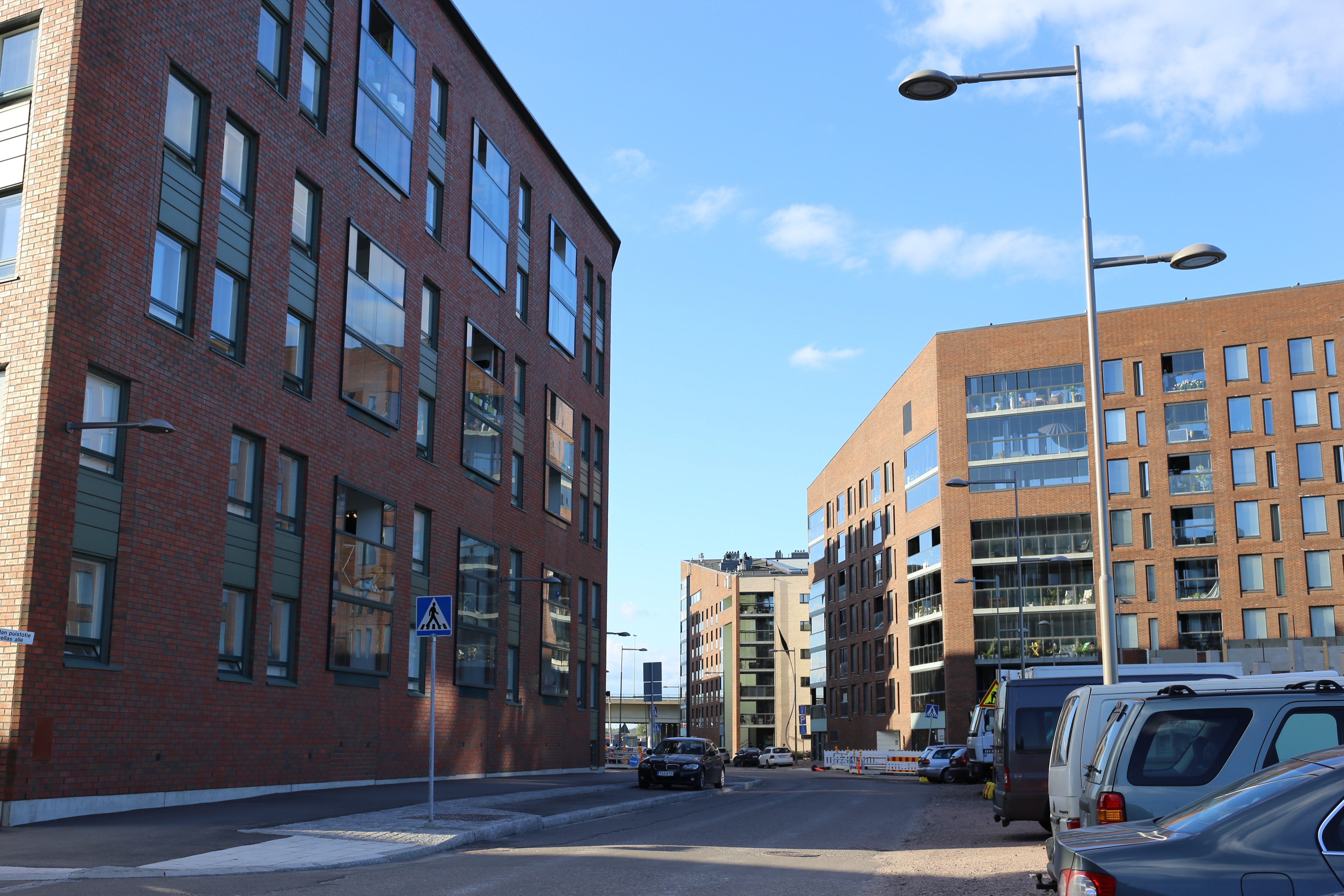 Katunäkymä Kalasatamasta